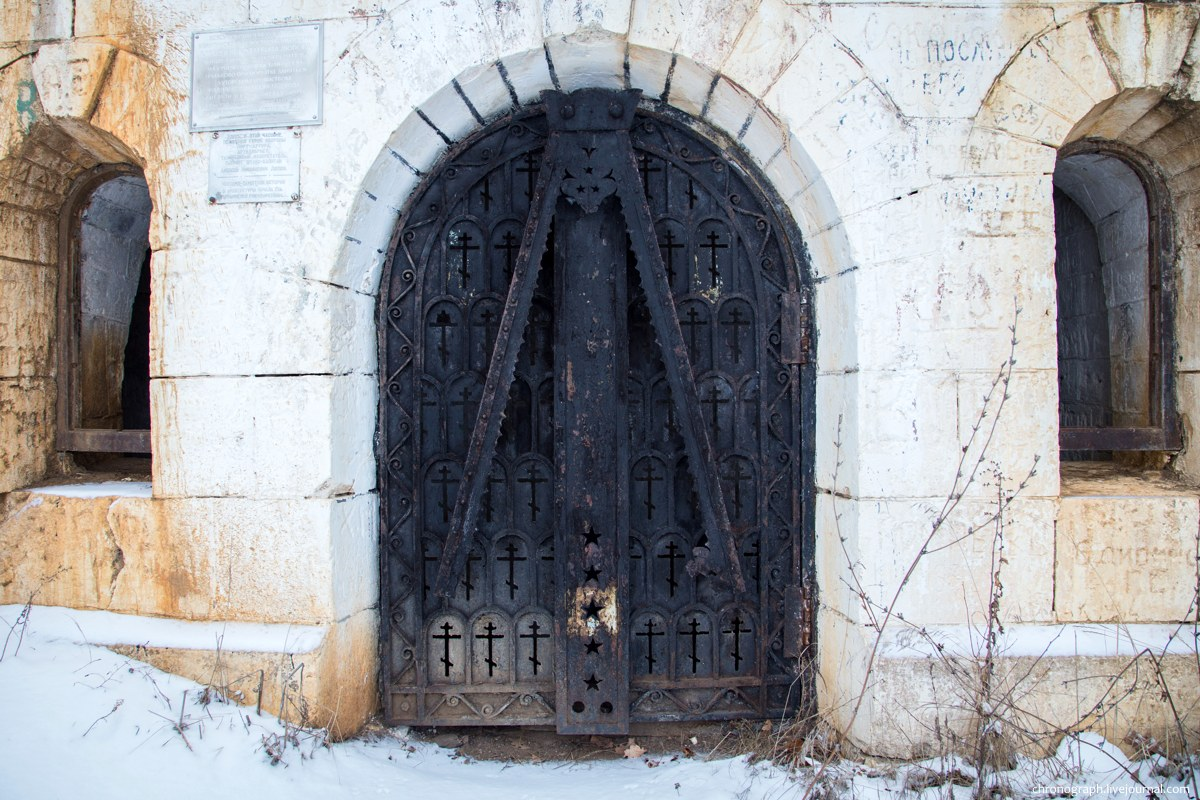 Железная дверь в усыпальницу Алексея Люпова